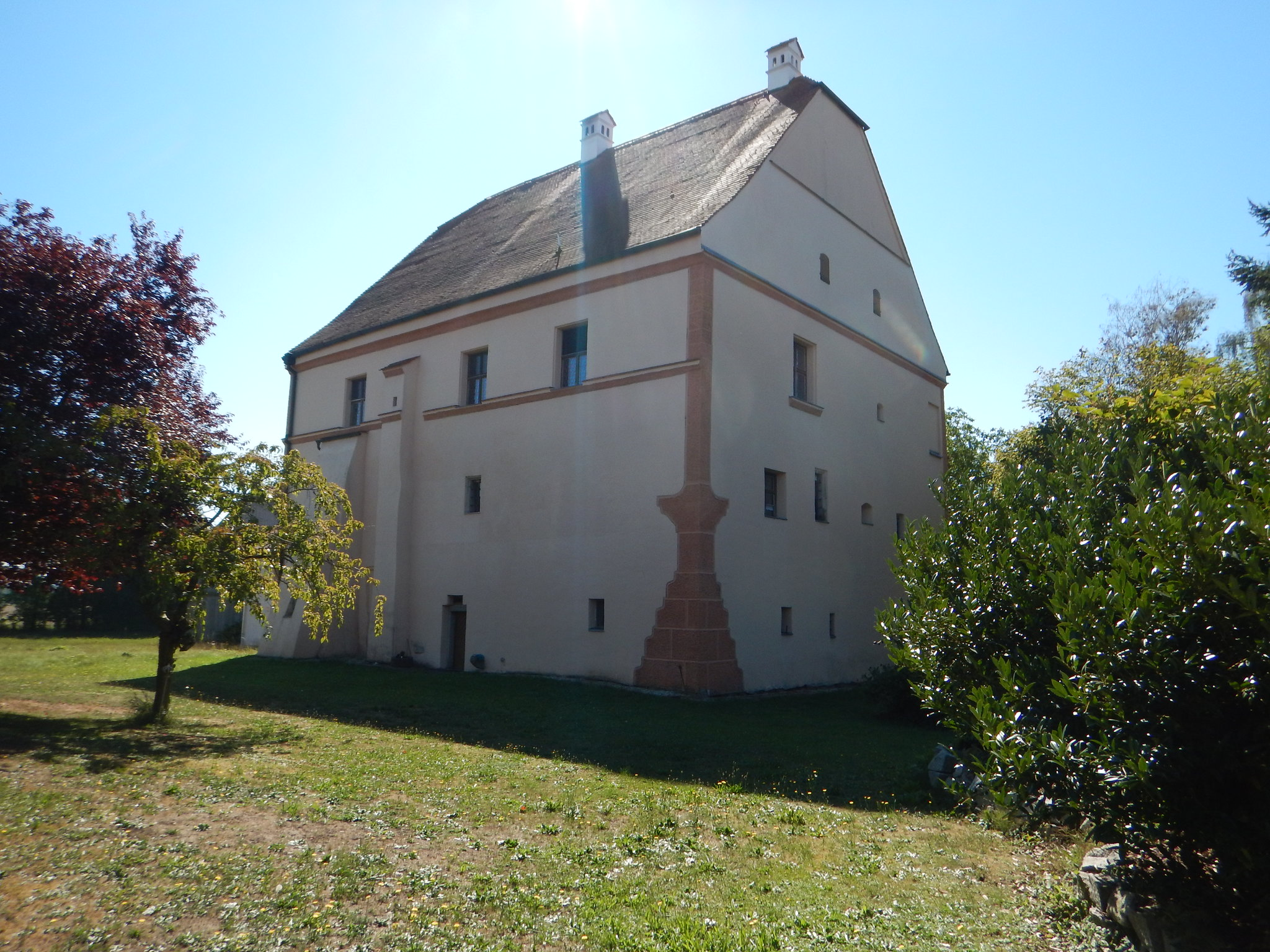 Schloss Walchsing, Gemeinde AldersbachThis is a photograph of an architectural monument.